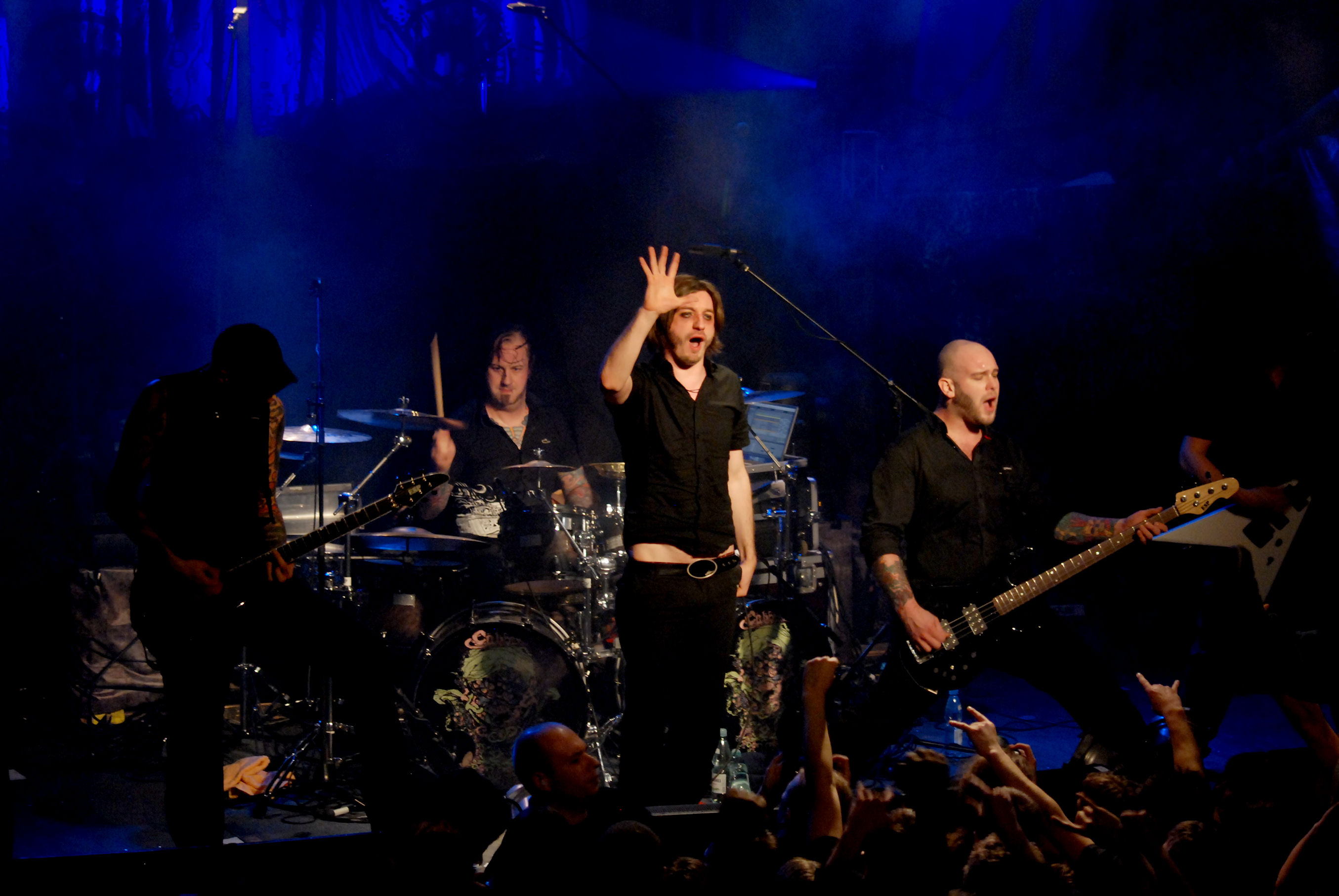 Caliban podczas koncertu w Klubie Studio w Krakowie